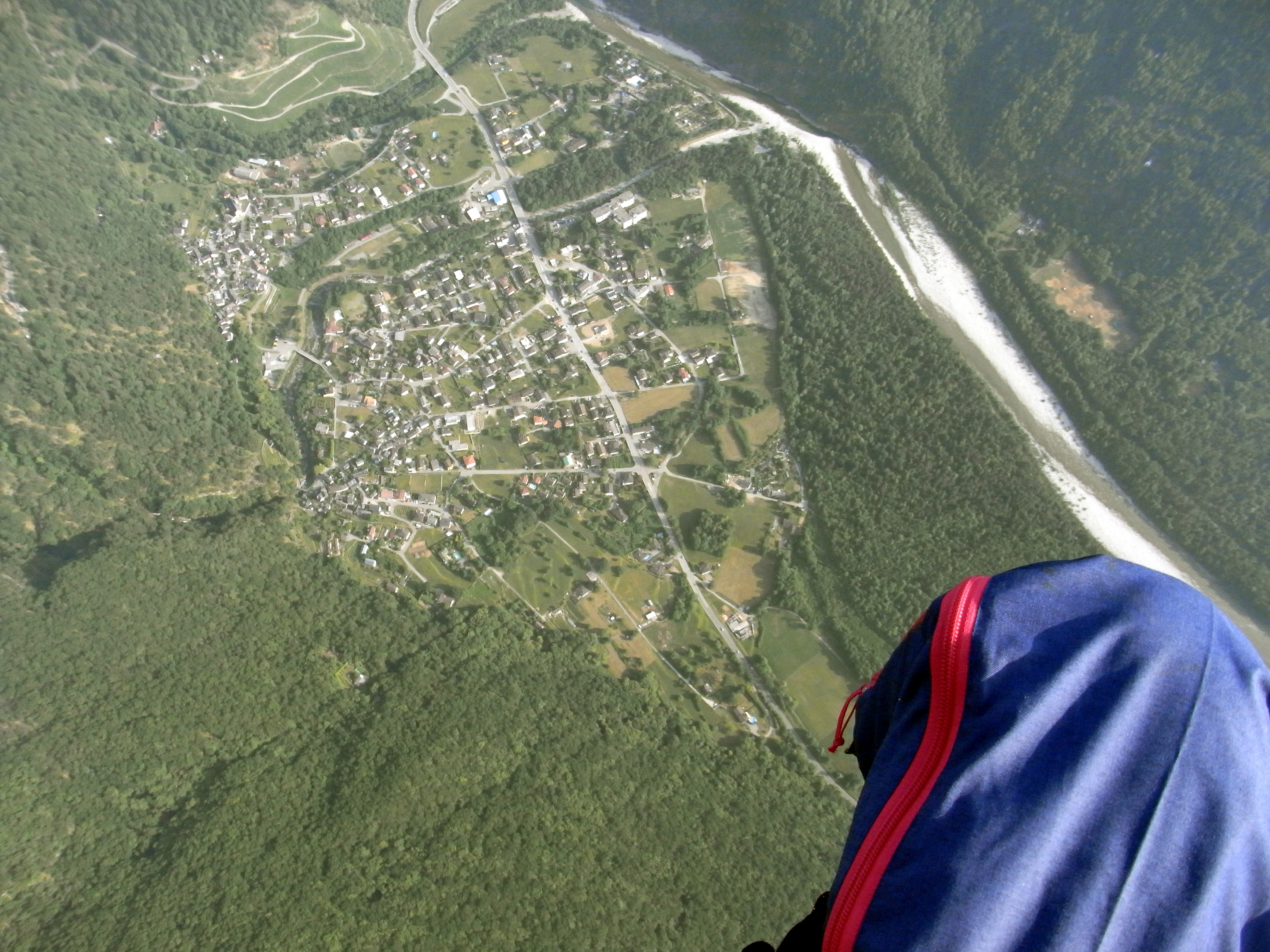 Gordevio